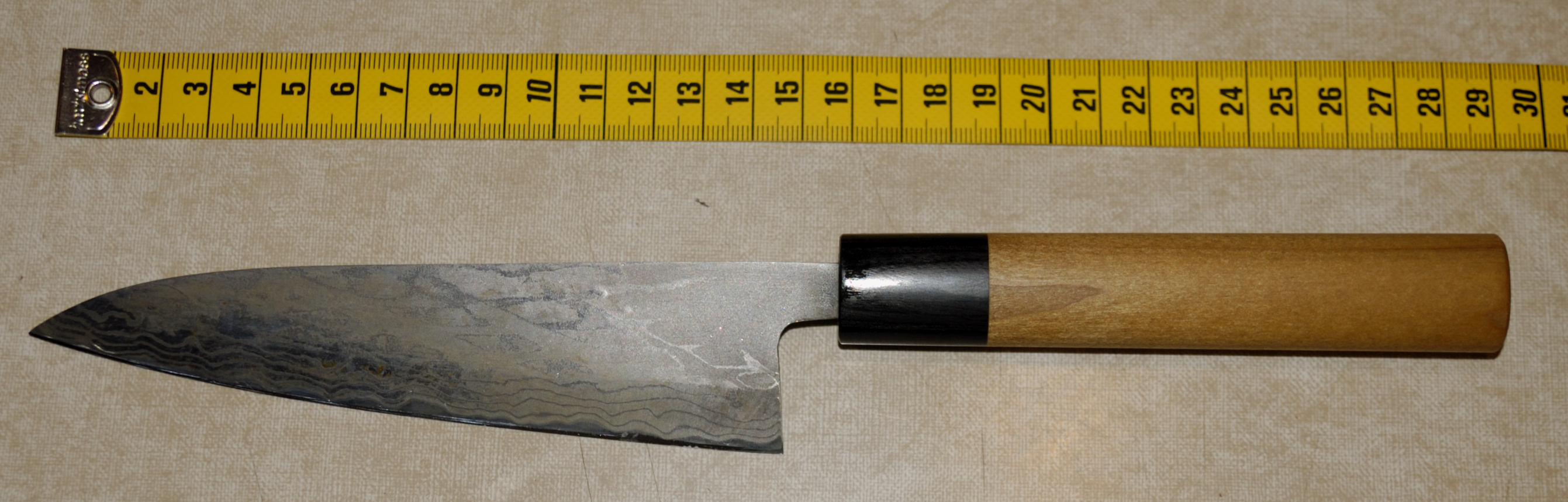 Gyuto Hocho